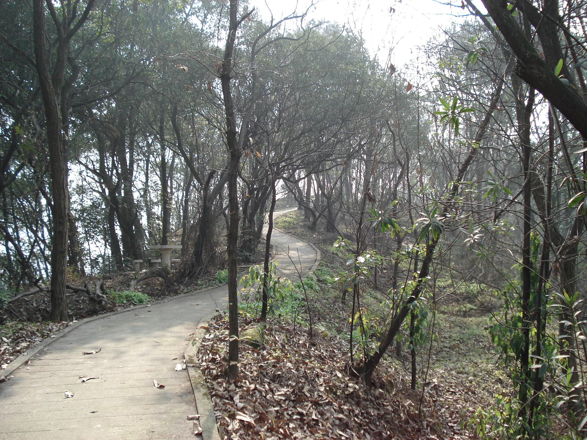 秀峰山